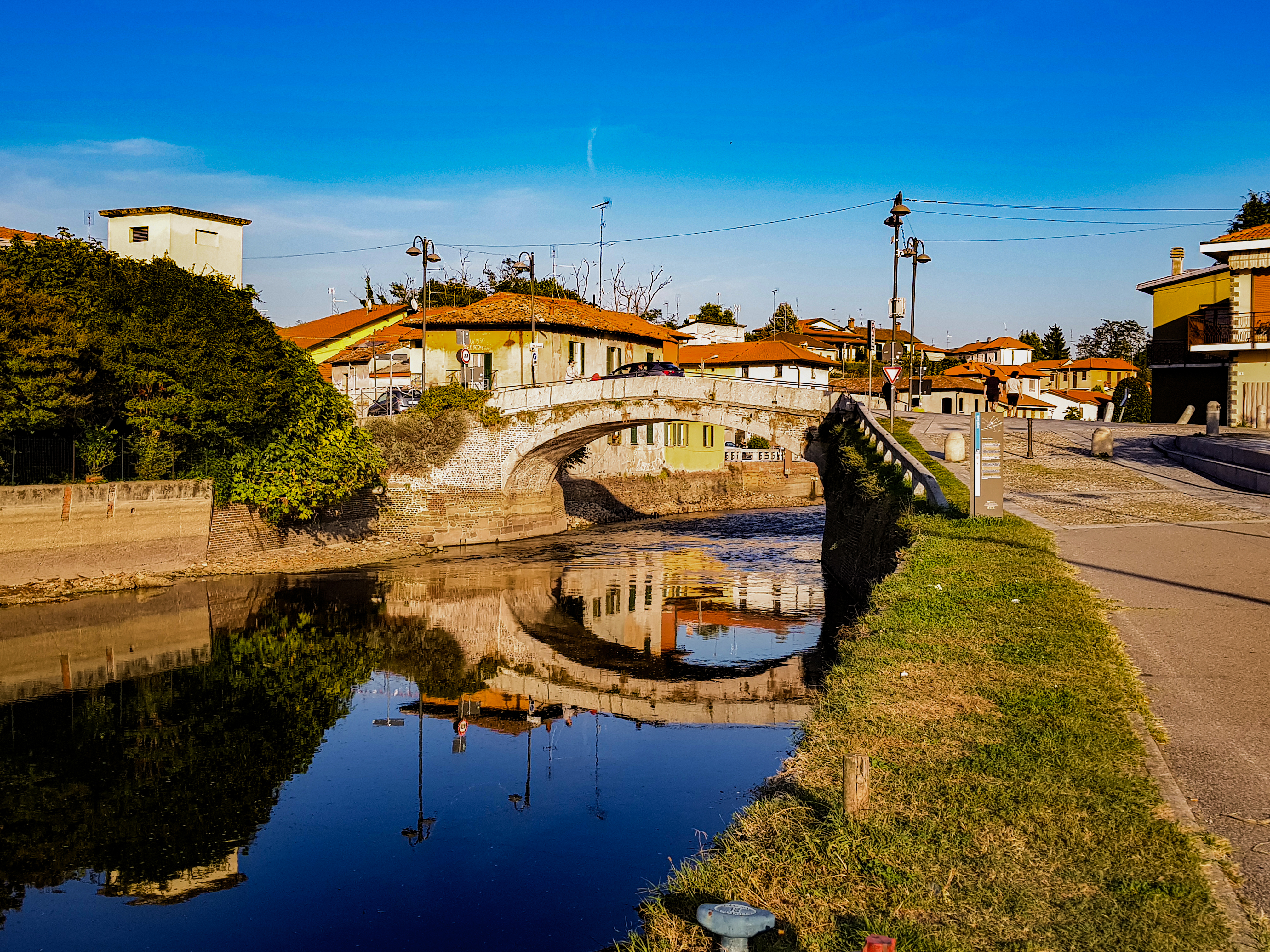 Ponte sul Naviglio Bernate - foto di Matteo Gornati This is a photo of a monument which is part of cultural heritage of Italy.